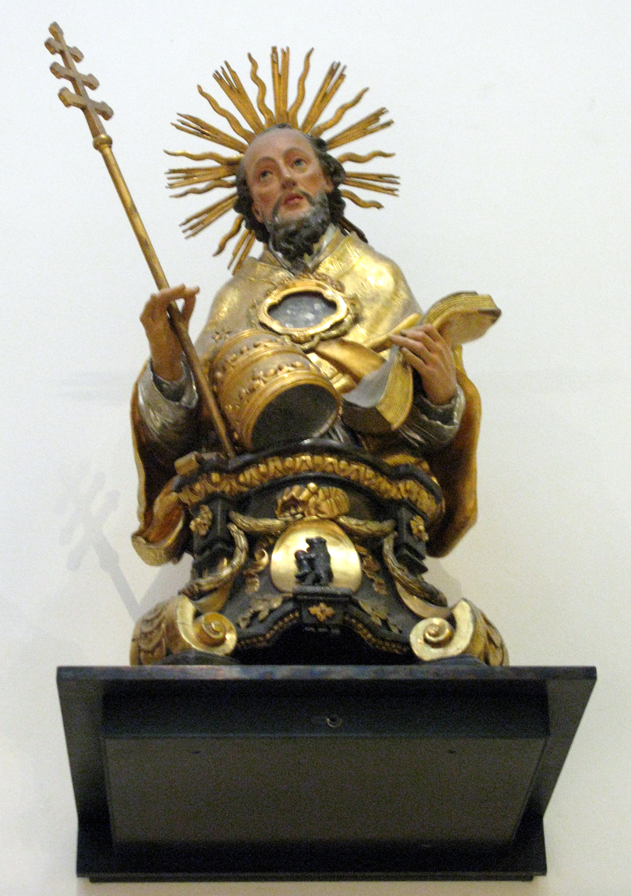 Reliquienbüste im Freiburger Augustinermuseum Hl. Pius, Joseph Hörr, 1775 (Schuhmacher)